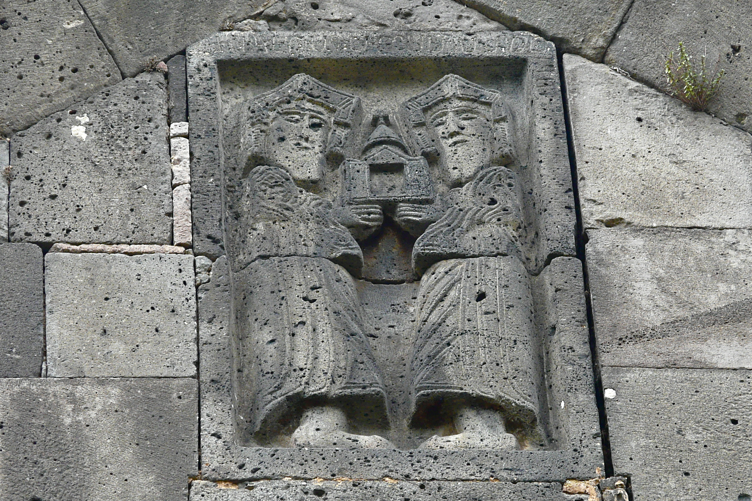 Dit klooster werd in de 10 de eeuw gesticht. Het oudste gebouw is de kerk van 'de Moeder Gods' uit 934. De grootste kerk, de 'Verlossers kerk' werd in opdracht van koningin Chosrovanusch opgericht in naam van haar 3 zonen. Een hoog-reliëf in de oostelijke gevel toont 2 van hen met een kerkmodel in de handen. Later werd het klooster uitgebreid met een academie, de Grigorkerk en een bibliotheek. zie ook